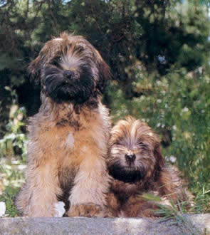 Cachorros de Terrier tibetano de Khyi-Lha